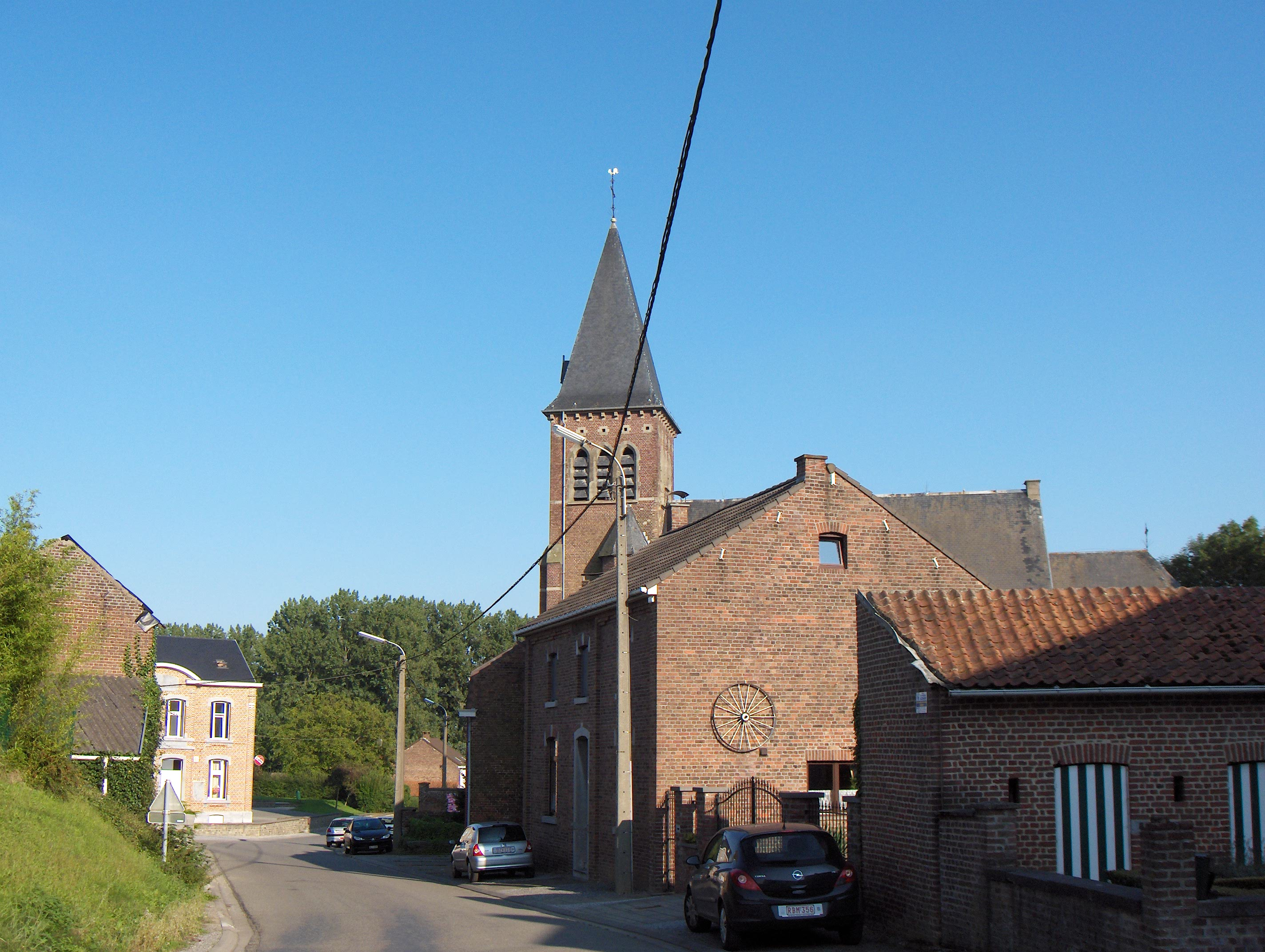 Poucet (Ortsteil der Gemeinde Hannut, Prov. Lüttich, Belgien), Dorfkirche (église Saint-Martin)